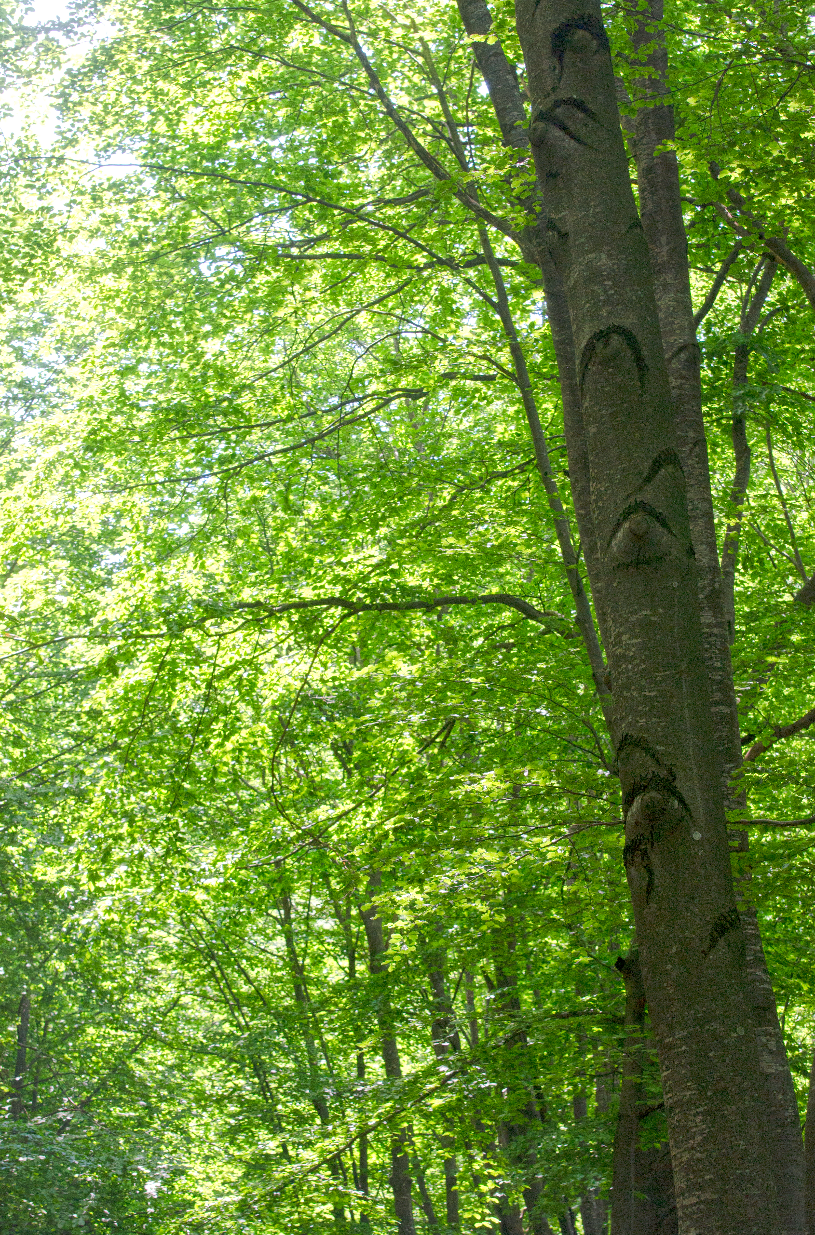 Хайдушки чукар